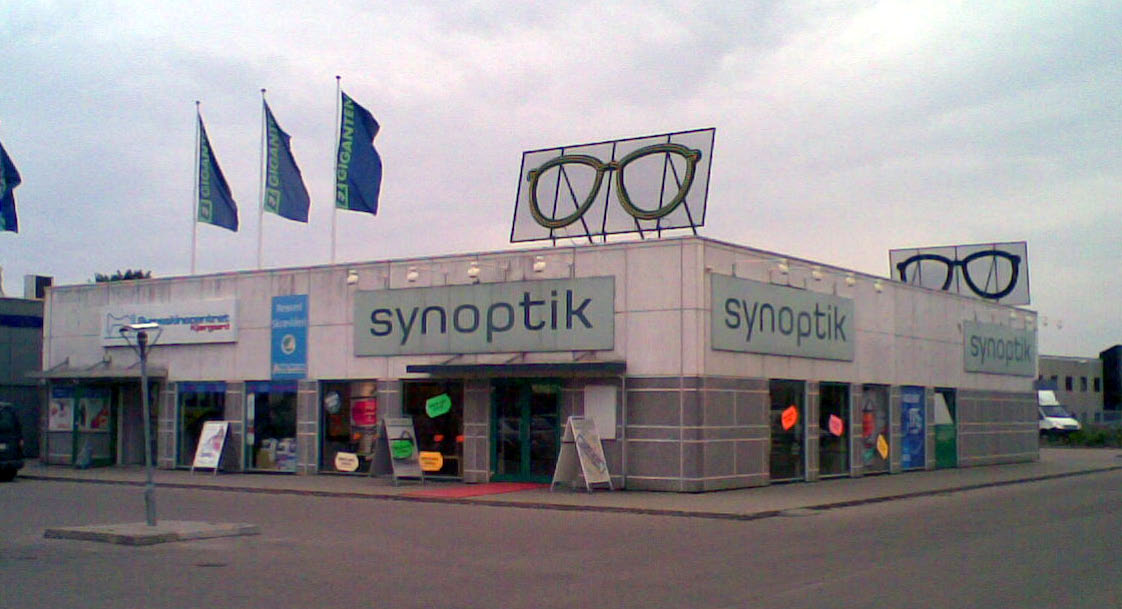 Synoptik i Tilst, Århus.